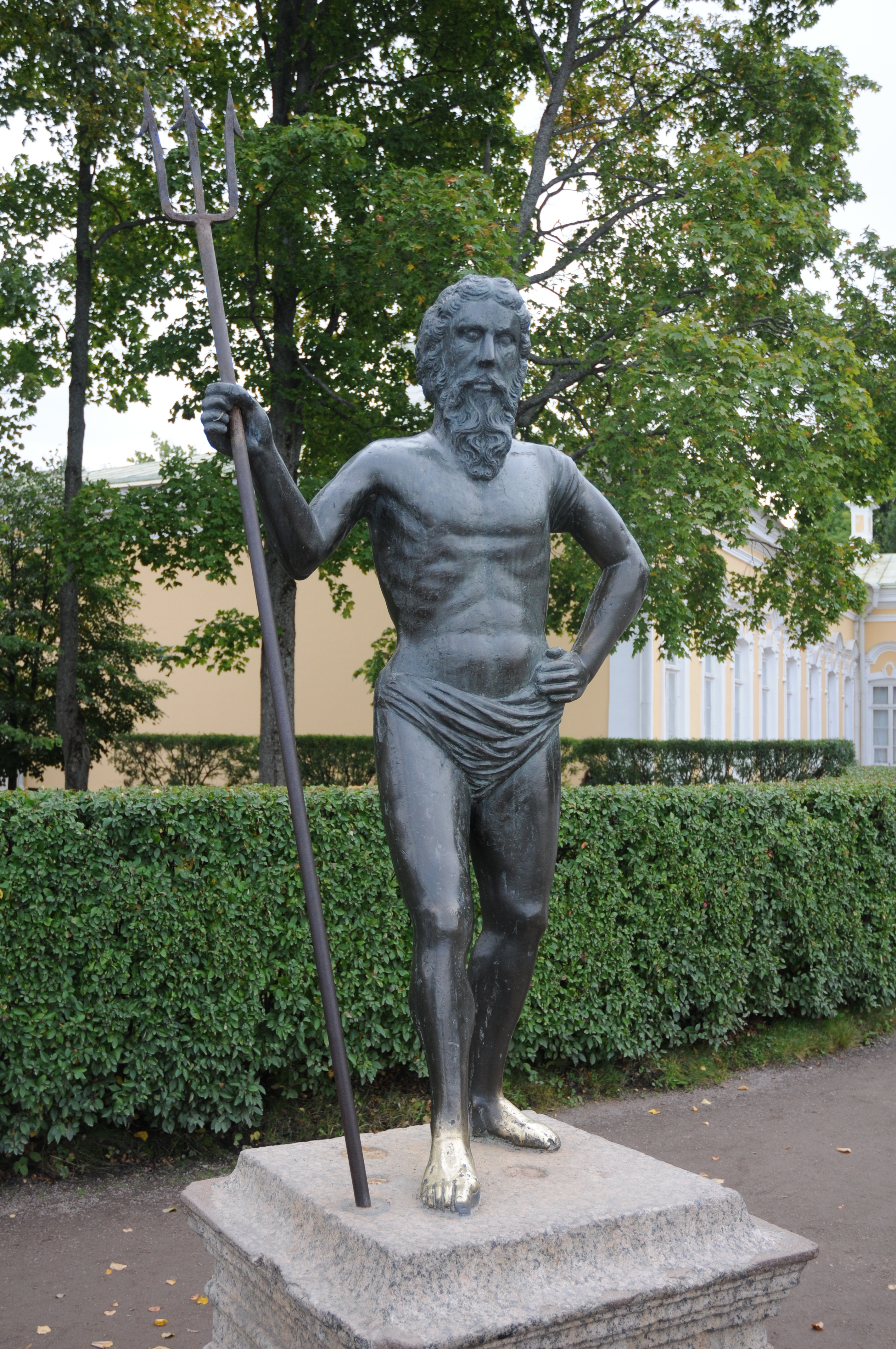 Статуя «Нептун» перед морским фасадом Монплезирского дворца